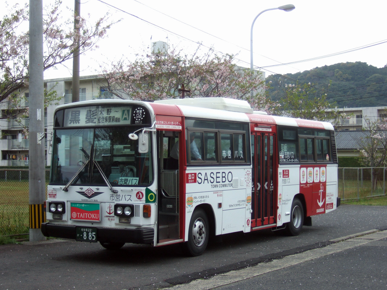 佐世保市営バス（佐世保市交通局）佐世保バーガー塗装車両